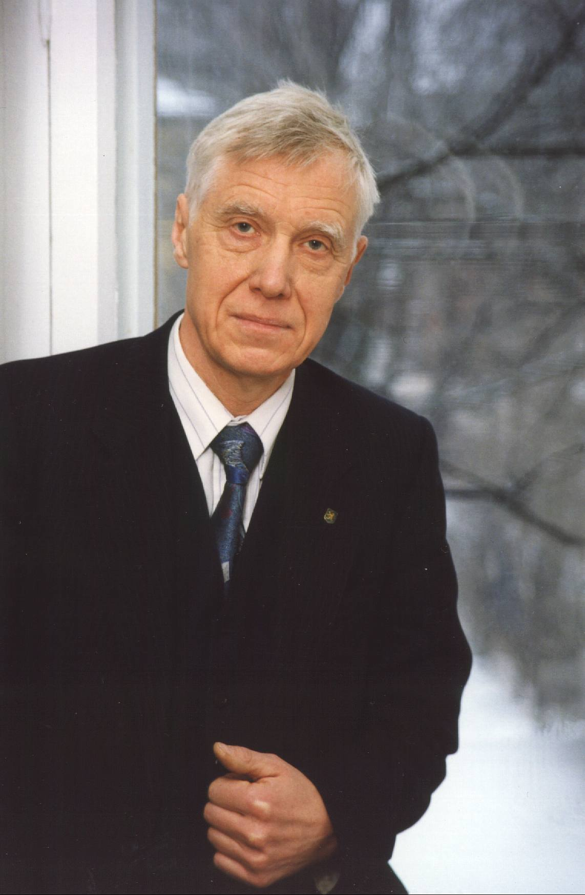 Jüri Pertmann